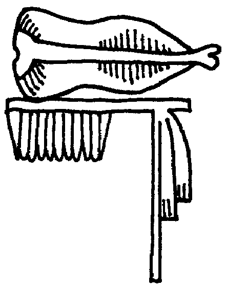 Gaustandarte von Letopolis